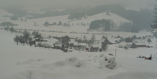 Eschenau im Hausrückkries winter 2006